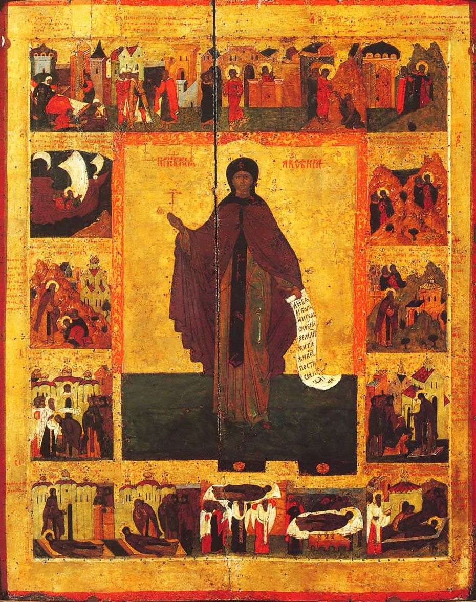 Преподобная Ксения с житием